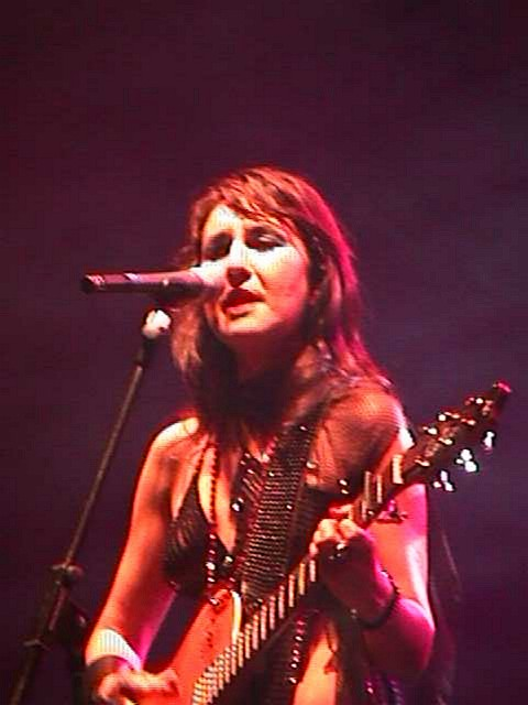 Eva Amaral en un concierto de su gira "Estrella de mar" en Cieza - Murcia